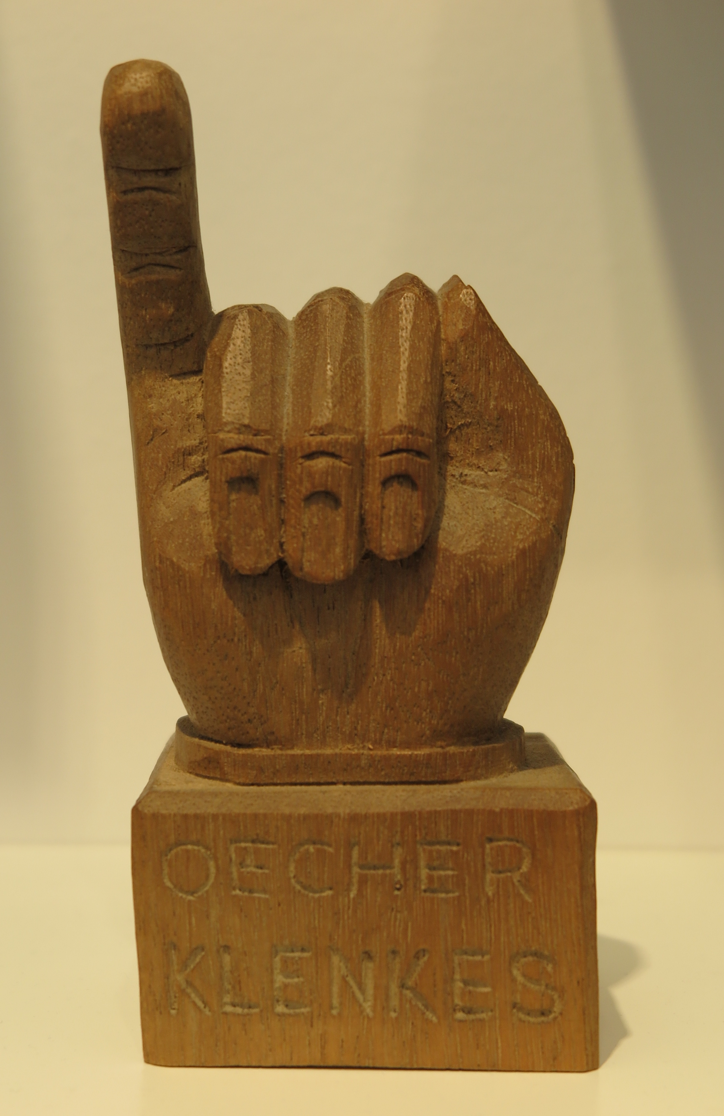 Modell des Klenkes im neuen Aachener Stadtmuseum „Centre Charlemagne”. Der Klenkes (emporgereckter kleiner Finger der rechten Hand) ist Erkennungszeichen von Aachenern und Gruß untereinander.